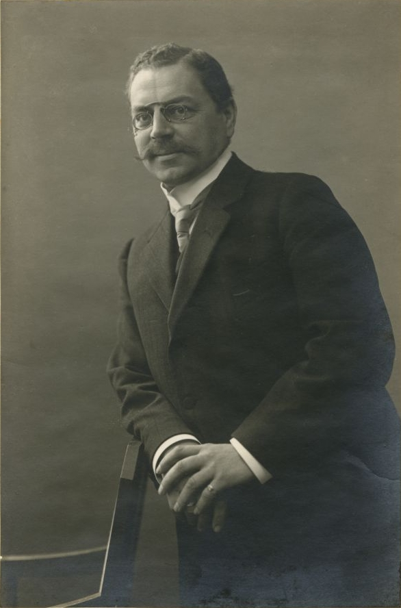 Paul Göbel, Oberbürgermeister Heilbronns von 1904 bis 1921